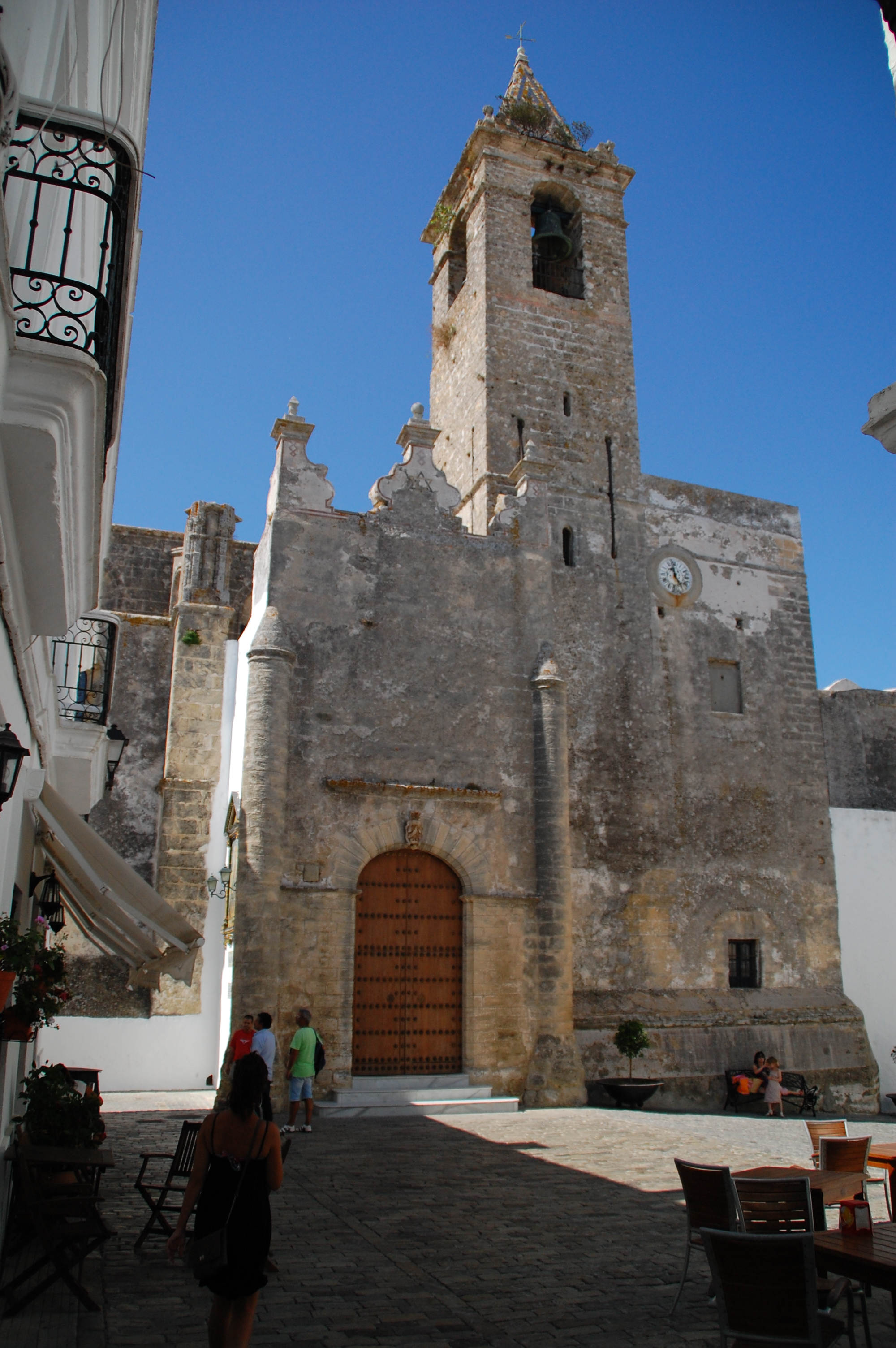 La façana de l'esglesia de Vejer.